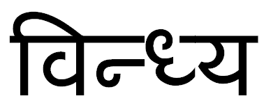 виндхья